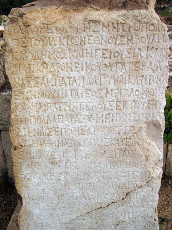 Patara